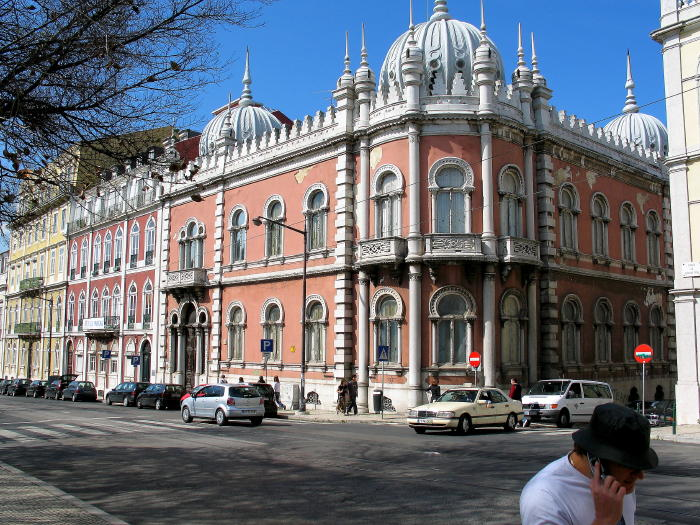 elegant facade (Casa de Macau, Rua da Escola Politécnica, à Praça do Príncipe Real)